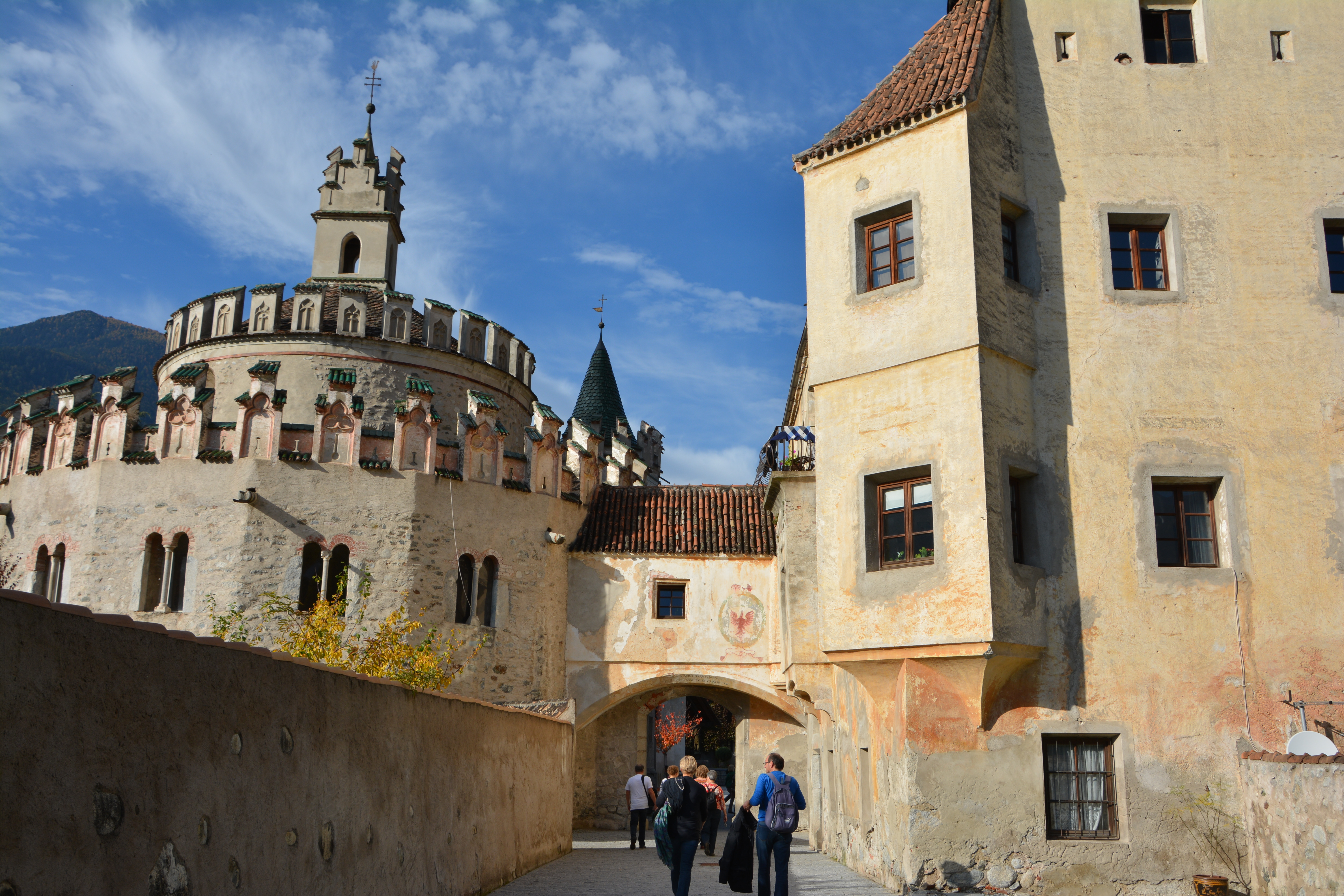 Kloster Neustift bei Brixen, südlicher Eingang zum Stiftshof. Links die Engelsburg genannte Michaelskapelle, erbaut um 1200.